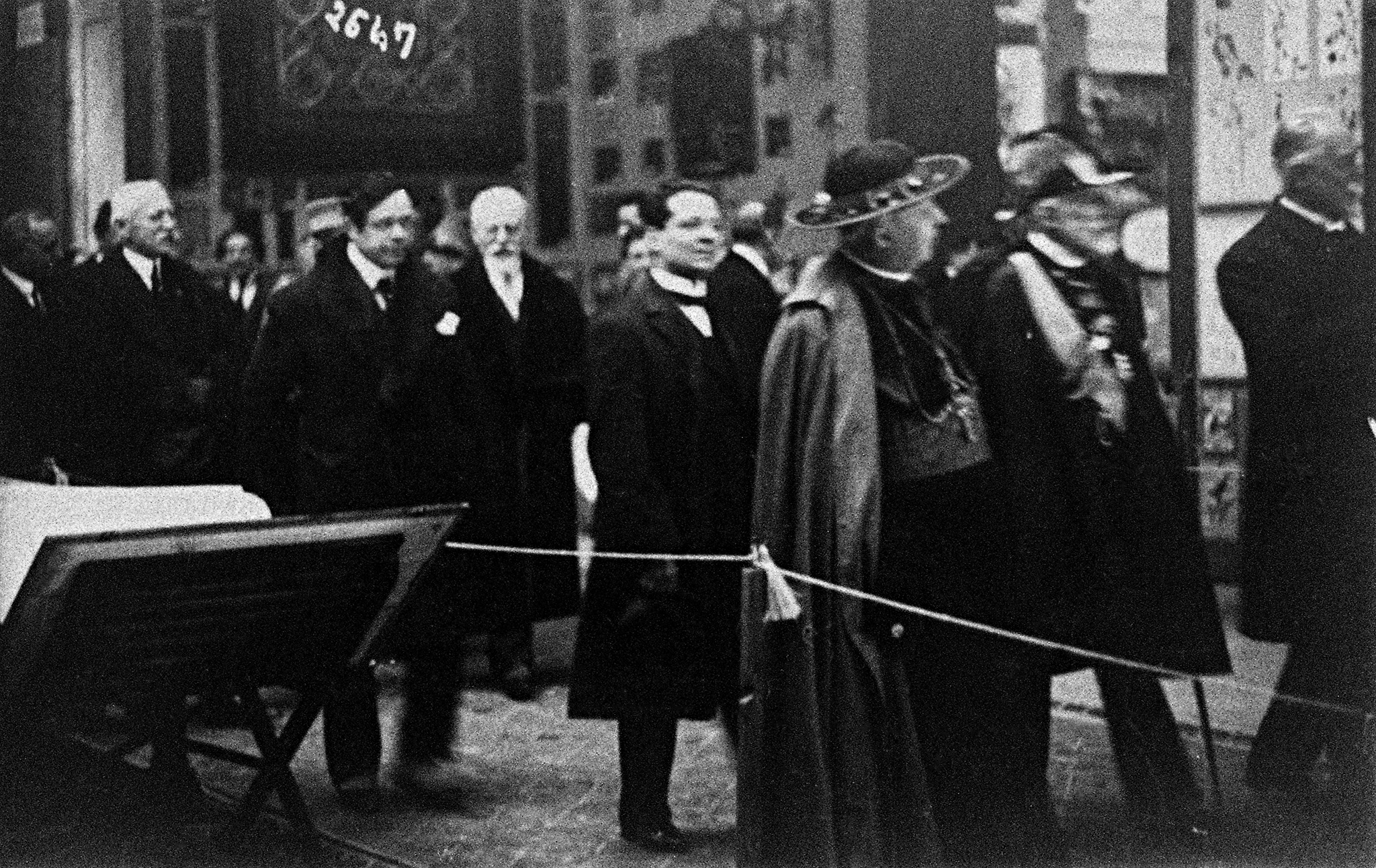 Międzynarodowa wystawa prac plastycznych we Florencji we Włoszech, na której Polska ekspozycja przygotowana została przez nauczycieli z Państwowego Instytutu Robót Ręcznych (PIRR). Wystawa miała miejsce w latach 30-tych XX wieku.